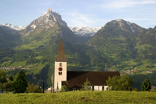 Kath. Kirche St.Gallus in Amden mit Mürtschenstock und Nüenchamm, Schweiz